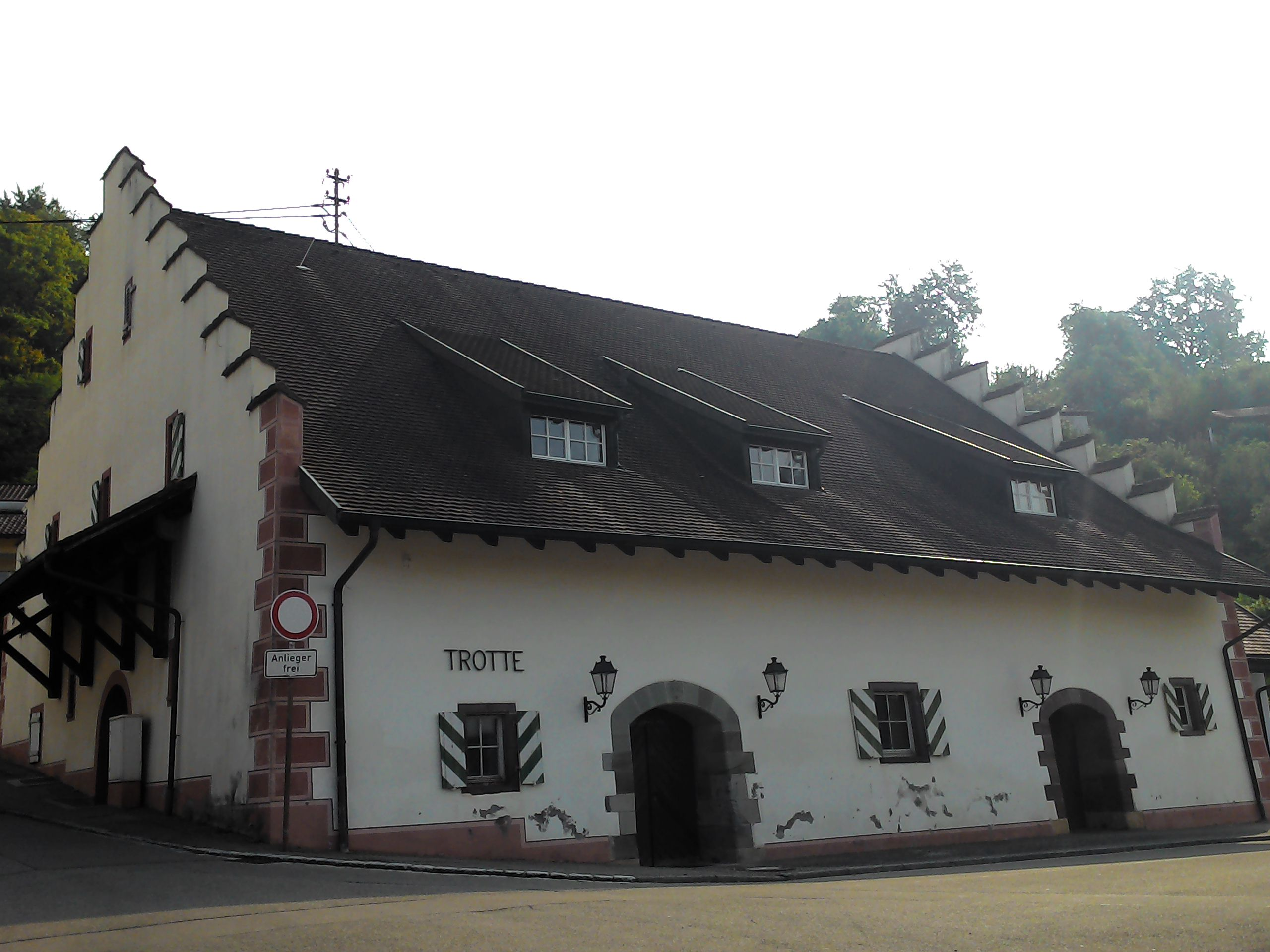 Küssaberg, Gemeinde im Landkreis Waldshut in Baden-Württemberg. Ortschaft Kadelburg: Die historische Trotte.